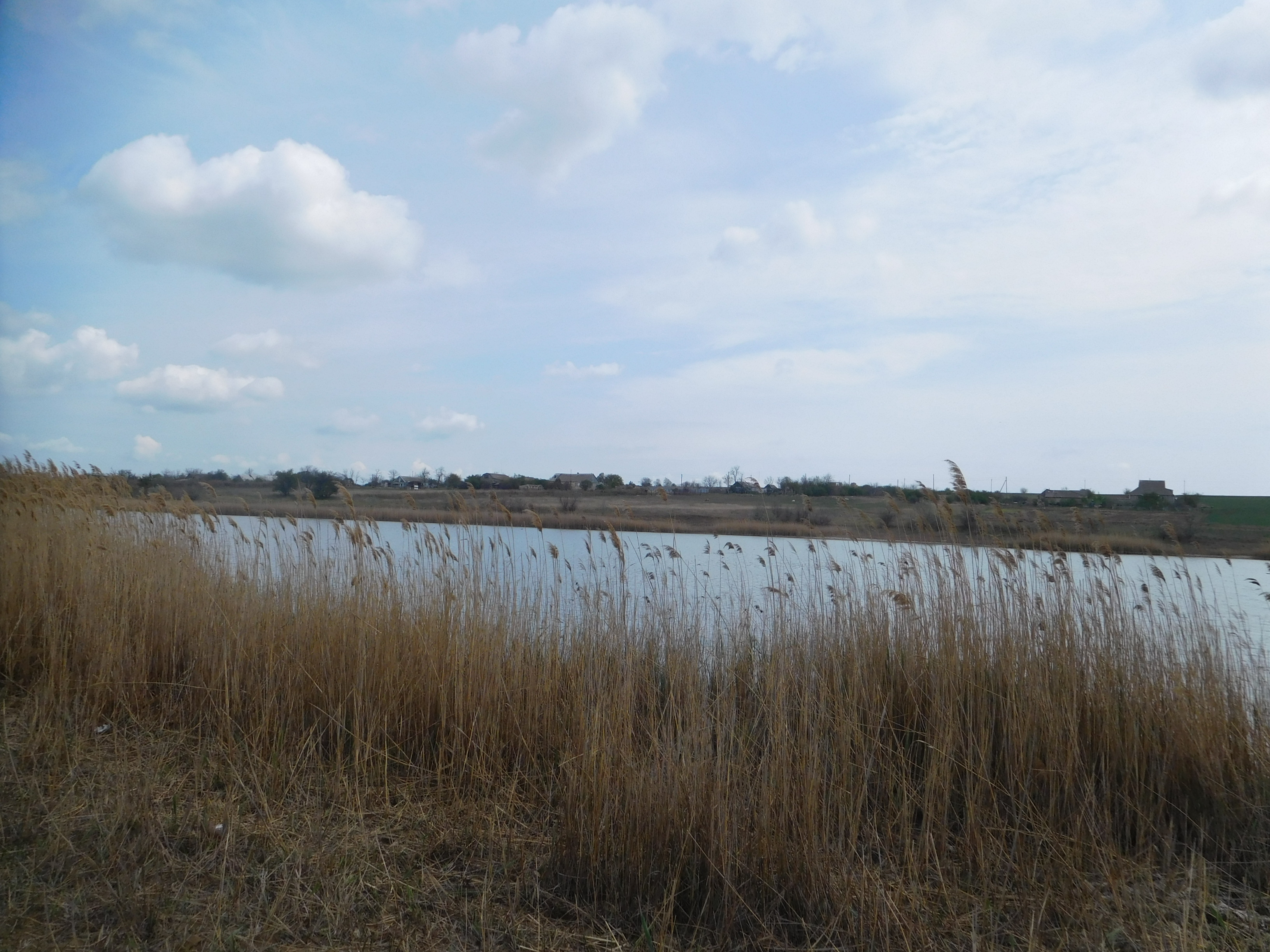 Вигляд на с. Миколаївка Роздільнянського району зі ставка біля села Секретарівка, Біляївський район, Одеська область